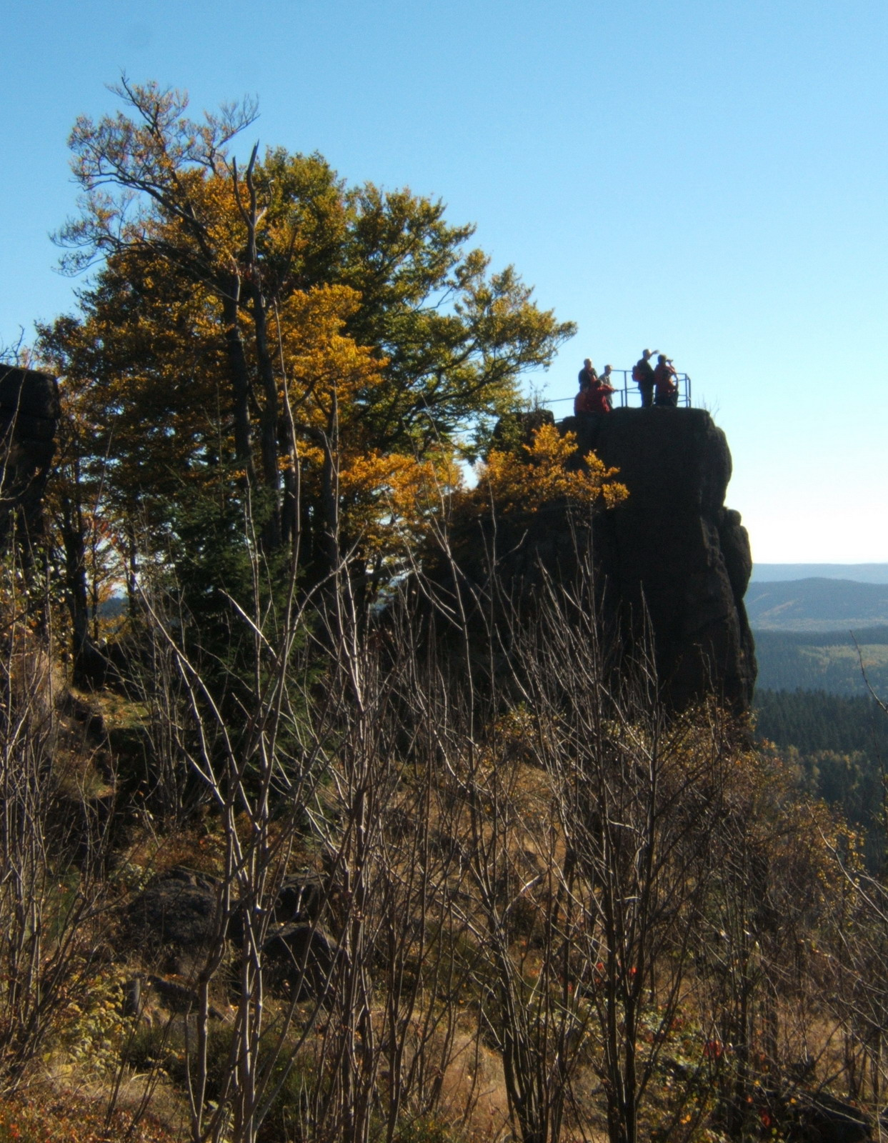 Aussichtsfelsen am Großen Hermannsberg